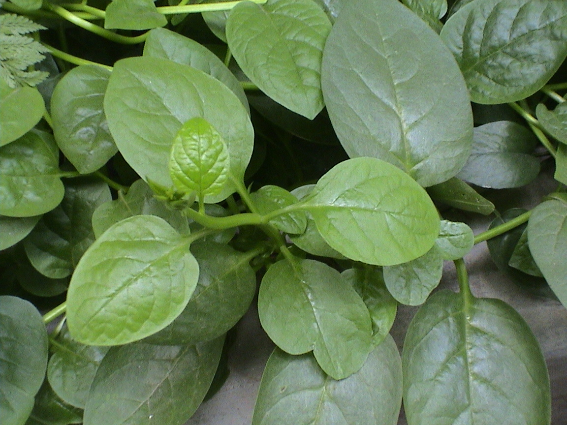 spanich, pui shak in Bn. Mamun2a 09:49, 12 September 2006 (UTC)